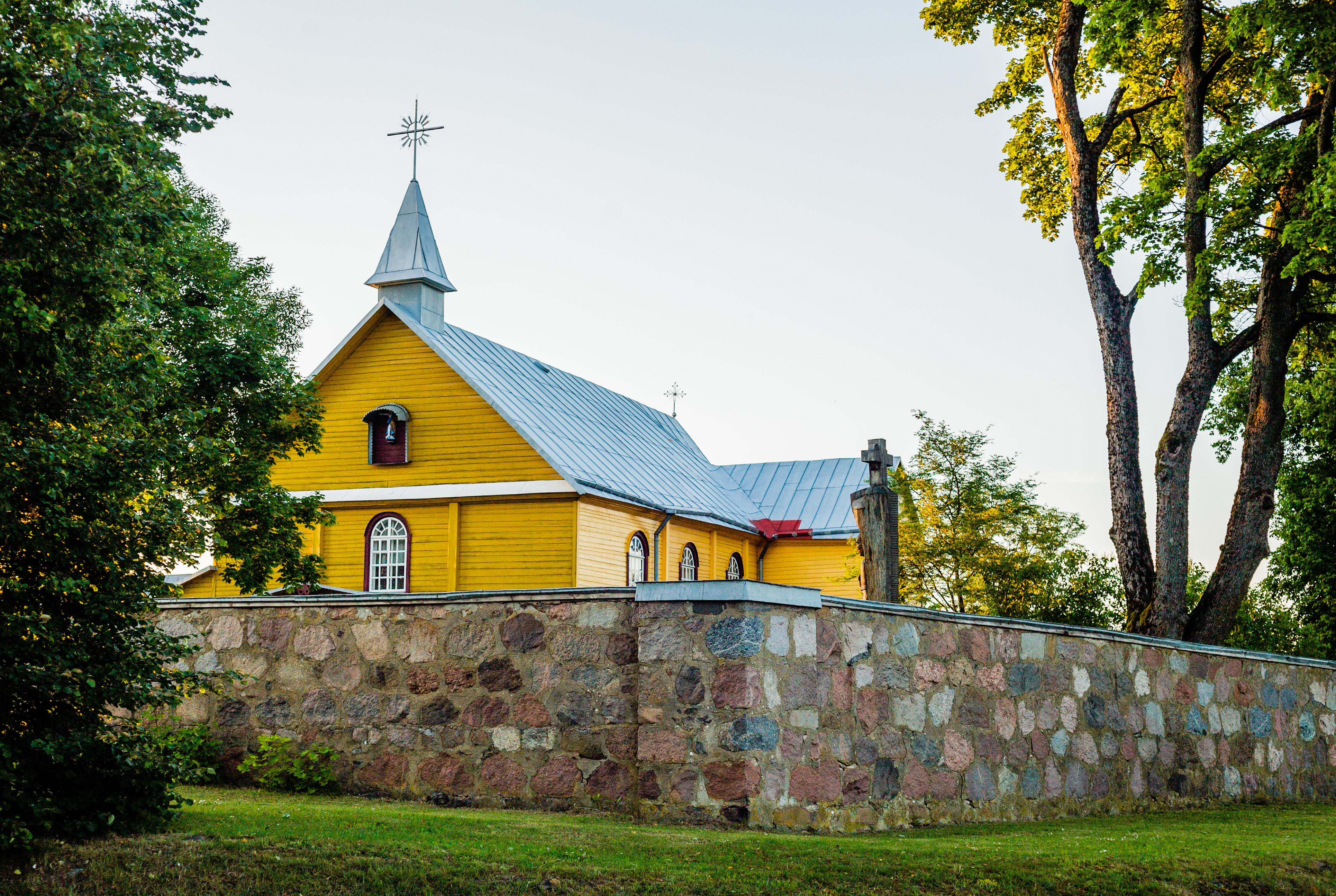 Dieveniškių bažnyčia